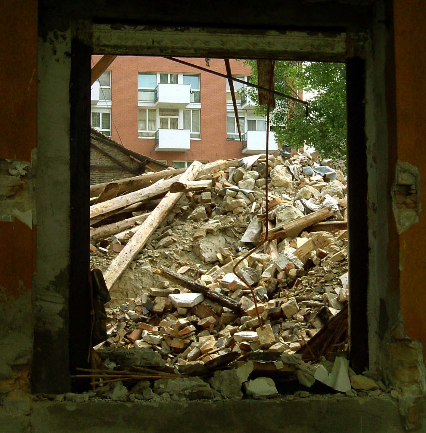 Romhalmazállapot